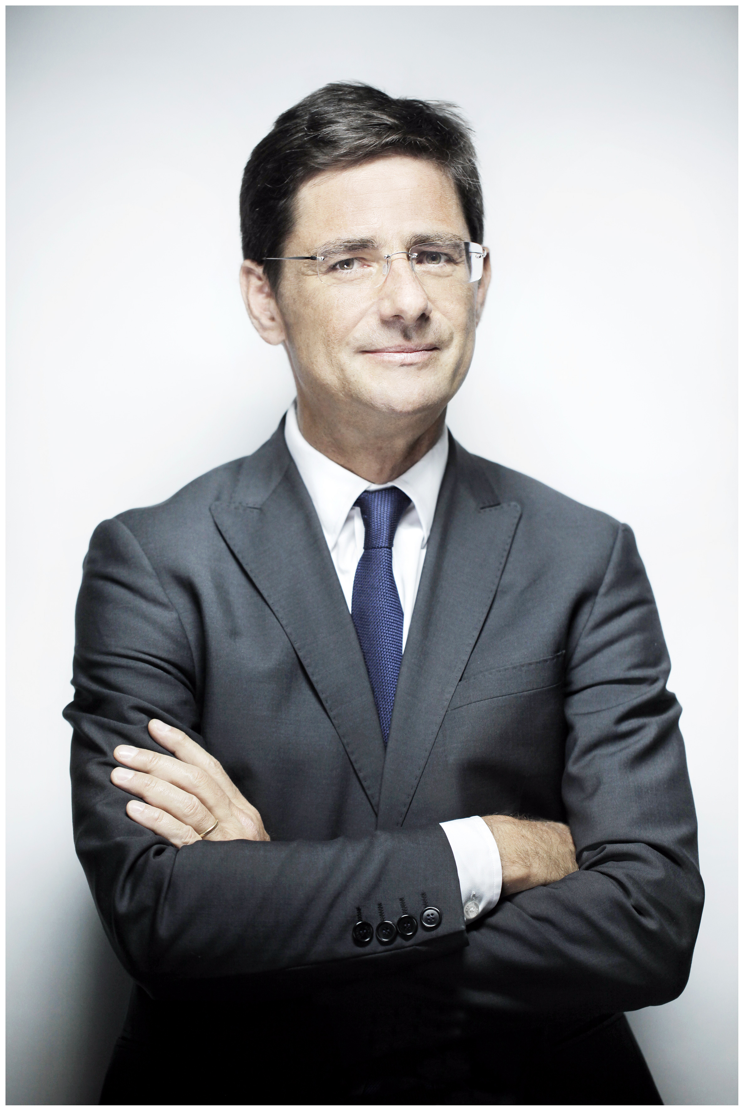 Nicolas Dufourcq